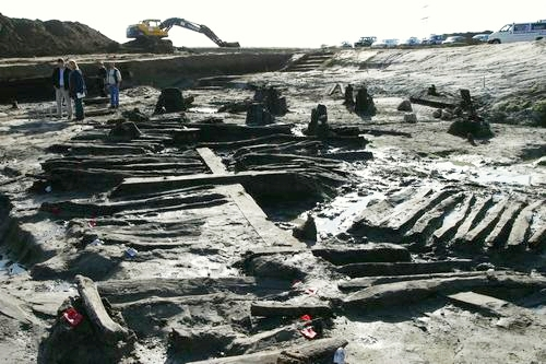 Im Jahr 2003, bei archäologischen Vorfelduntersuchungen zum Bau der Bundesautobahn 20, vorgefundene Hölzer des frühdeutschen Wehrspeichers (Kemlade) von Wodarg im Landkreis Demmin in Vorpommern. Eine Replik des Wehrspeichers wurde in der Tollenseniederung bei Burg Klempenow aufgebaut.